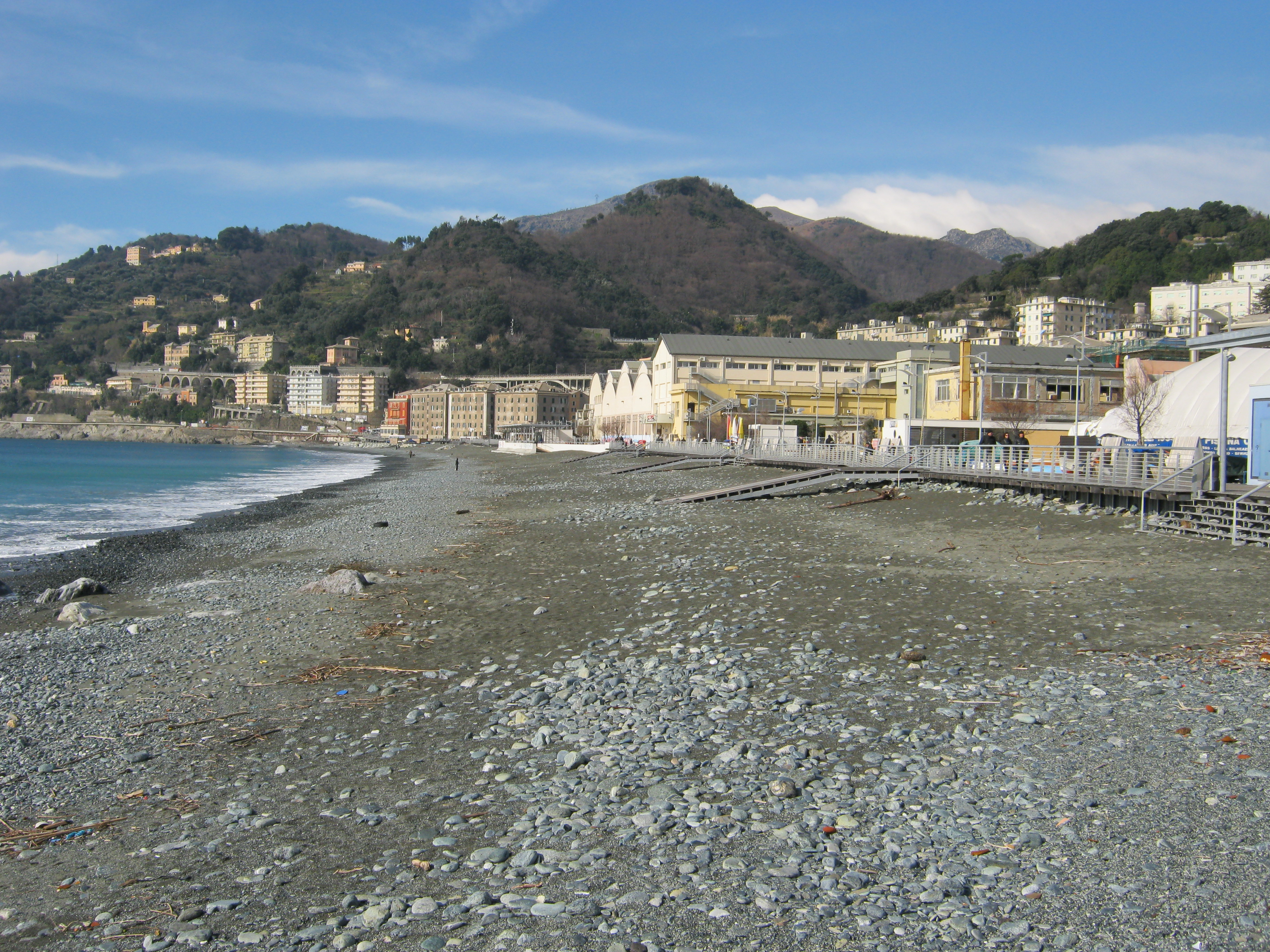 La spiaggia "di san Erasmo" a Voltri. Ovvero, la spiaggia a ponente della foce del Leira. Sono visibili i capannoni dei "Cantieri Campanella", poi usati dall'Ansaldo per la carpenteria leggera ed attualmente ospitanti attività sportive e ricreative. La collina di aspetto roccioso sullo sfondo è il Bric Rocche dei Gatti